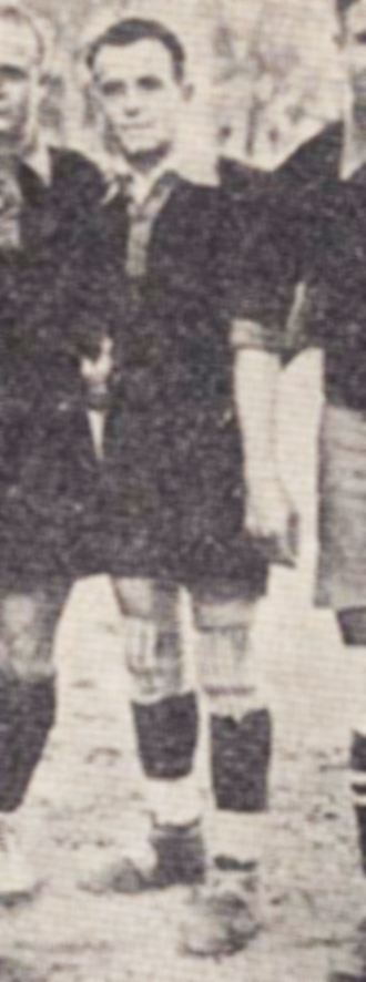 Ο Κώστας Νεγρεπόντης κατά την περίοδο που αγωνιζόταν ως ποδοσφαιριστής